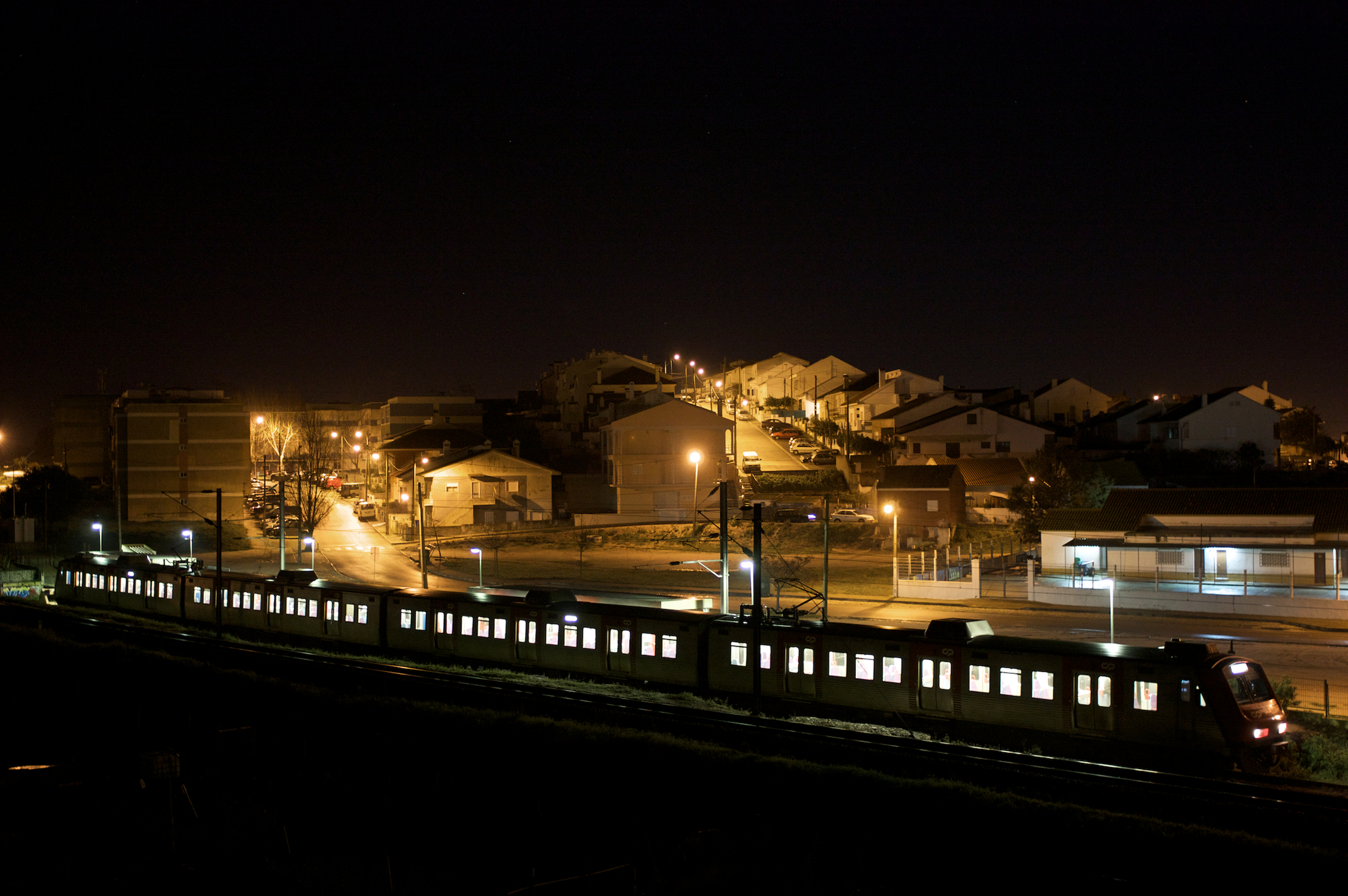 Tipo: Marcha de serviço 27802 [Praias • Sado–A - Setúbal] Local: Apeadeiro de Praias • Sado–A [Linha do Sul, PK 33] Data e hora: 4 de Março de 2010 [01h13] Material: Automotora 23xx [Unidade Quádrupla Eléctrica] esta fotografia foi publicada no .